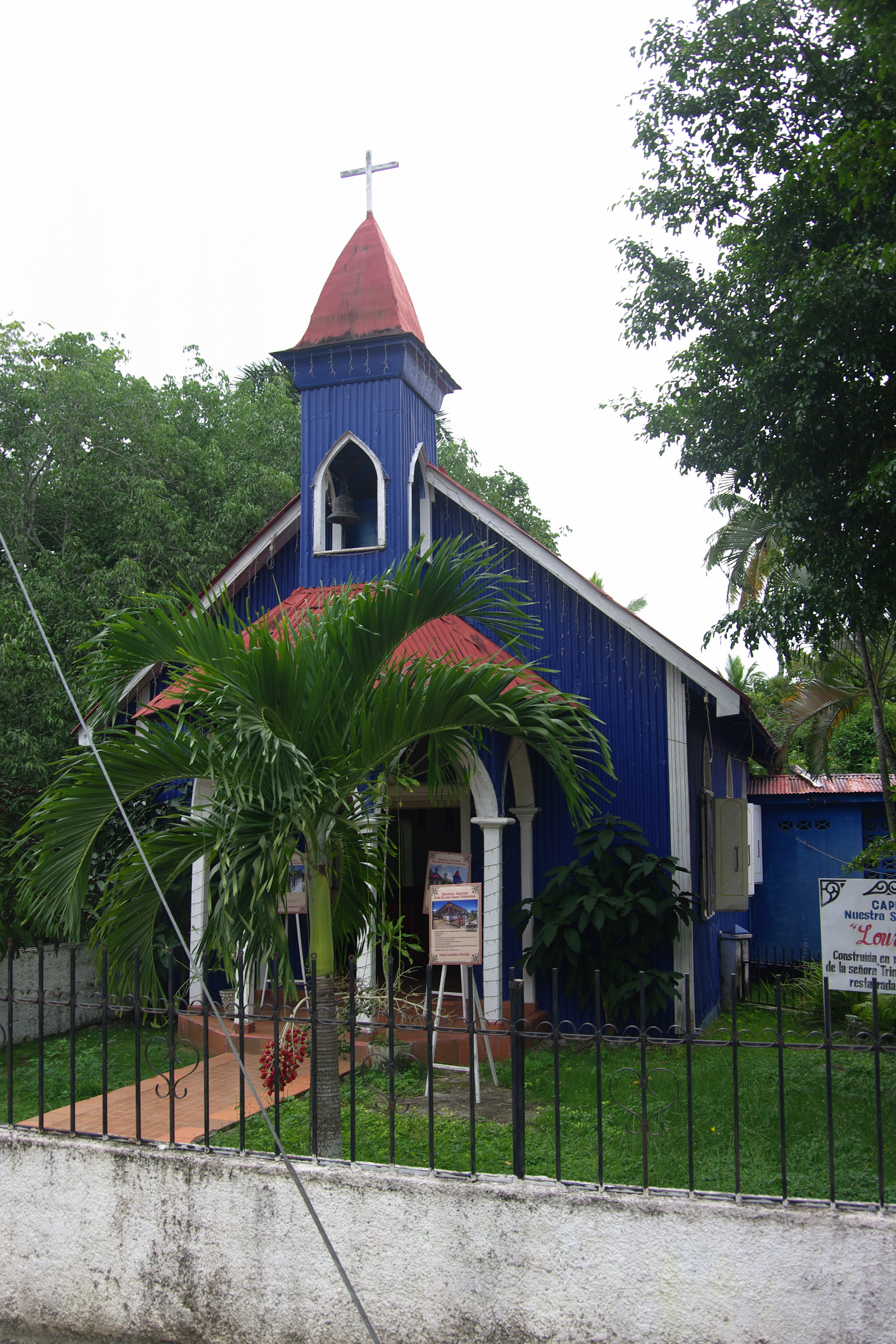 Kapelle Nuestra Senora de Lourdes